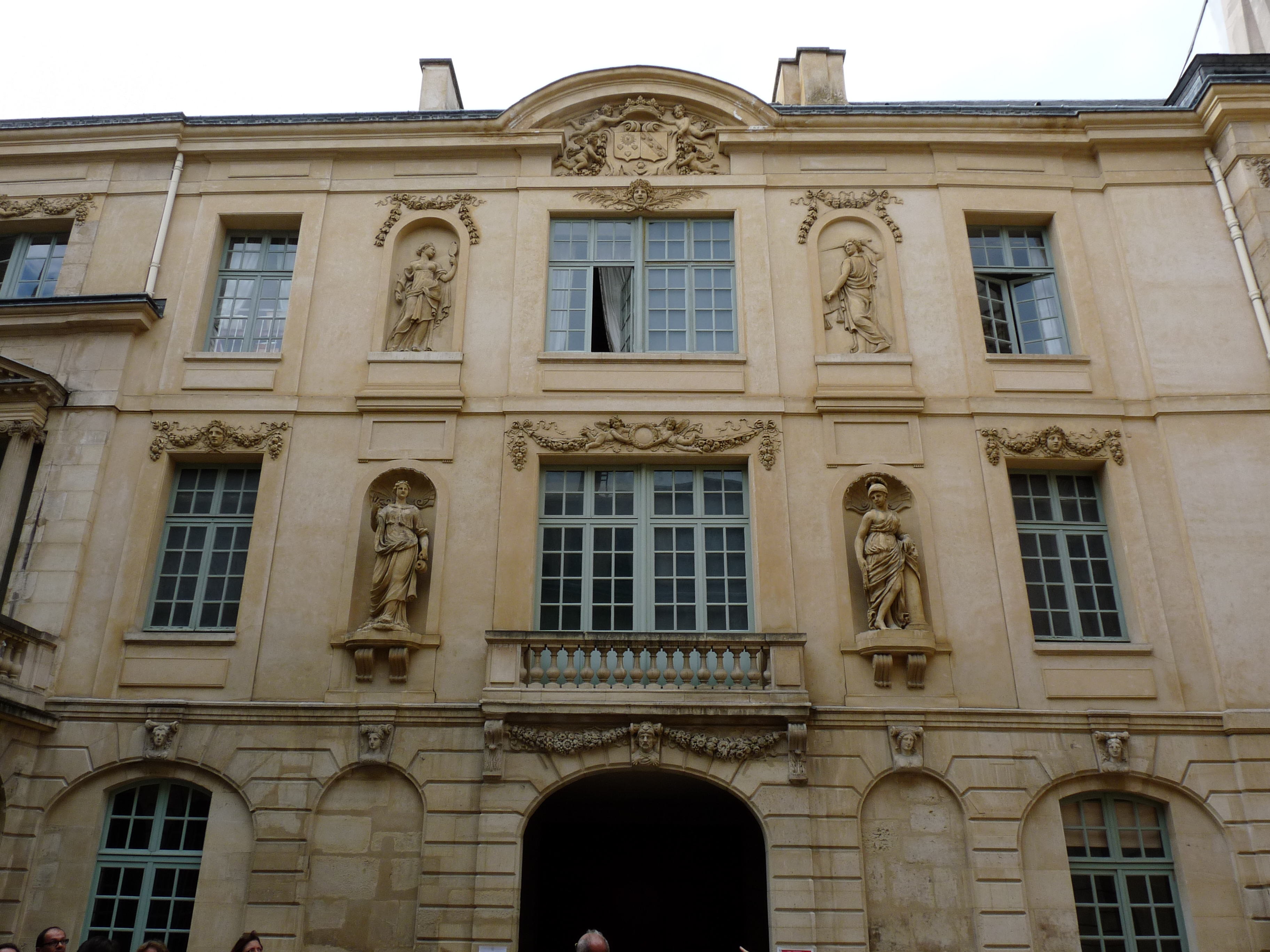 L'hôtel Amelot de Bisseuil, dit des Ambassadeurs de Hollande, à Paris. Le bâtiment séparant la deuxième cours de la rue des Guillemites.